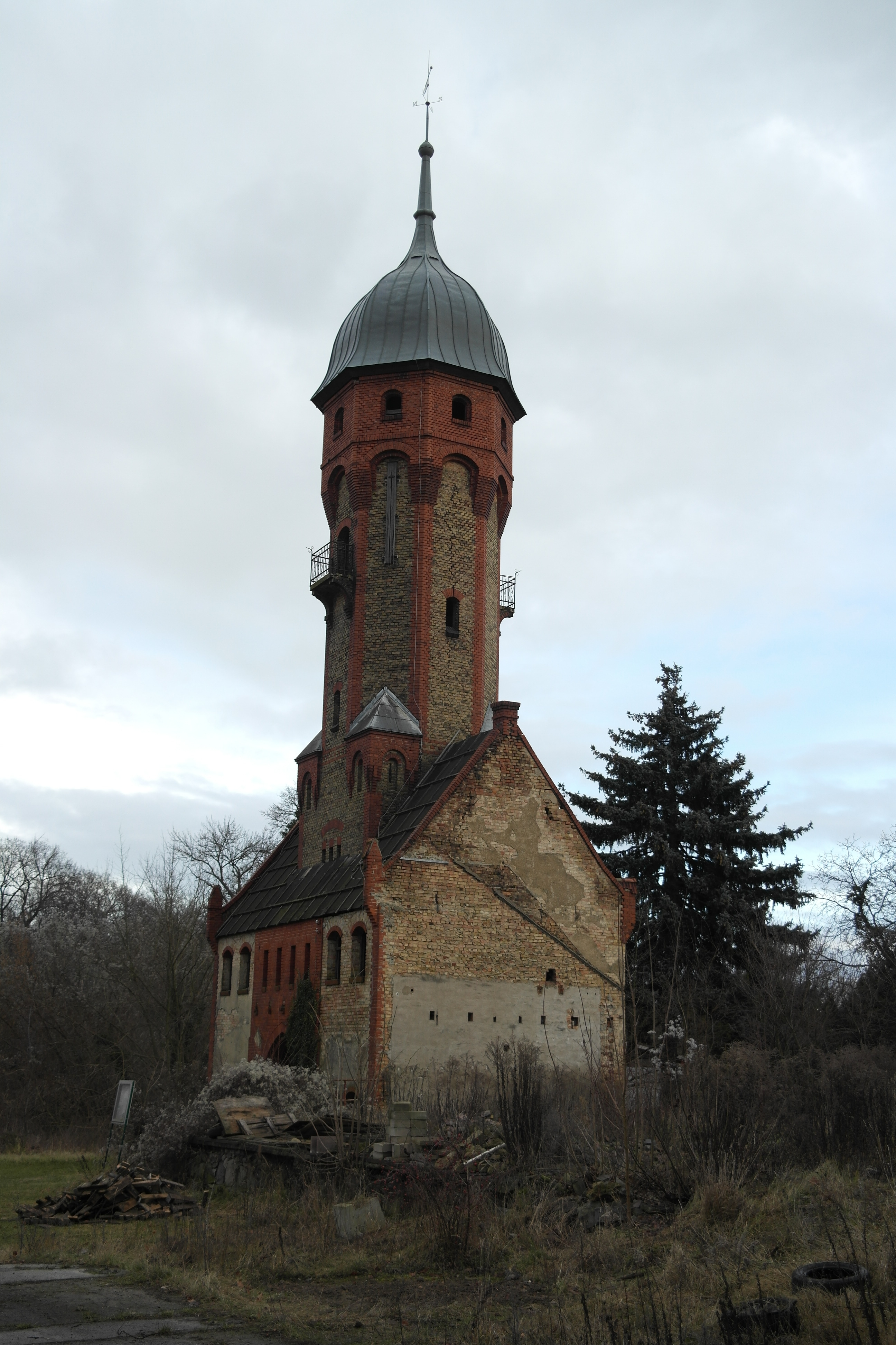 Wasserturm des Gutes Dahlewitz